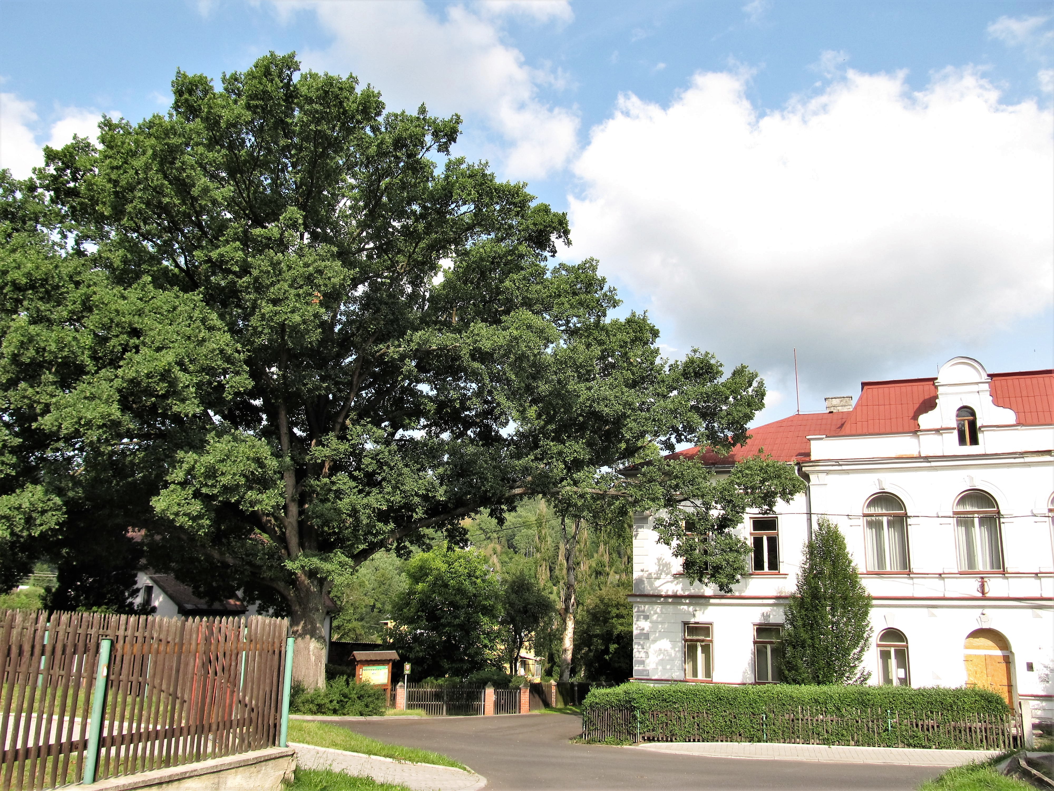 Hudební škola a památkově chráněný dub ve Školní ulici